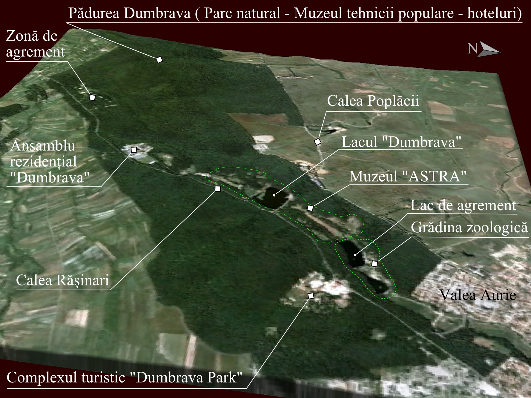 Prelucrare 3D pentru Padurea Dumbrava, Sibiu. Imagine realizata cu date SRTM furnizate liber de NASA si textura World Imagery.